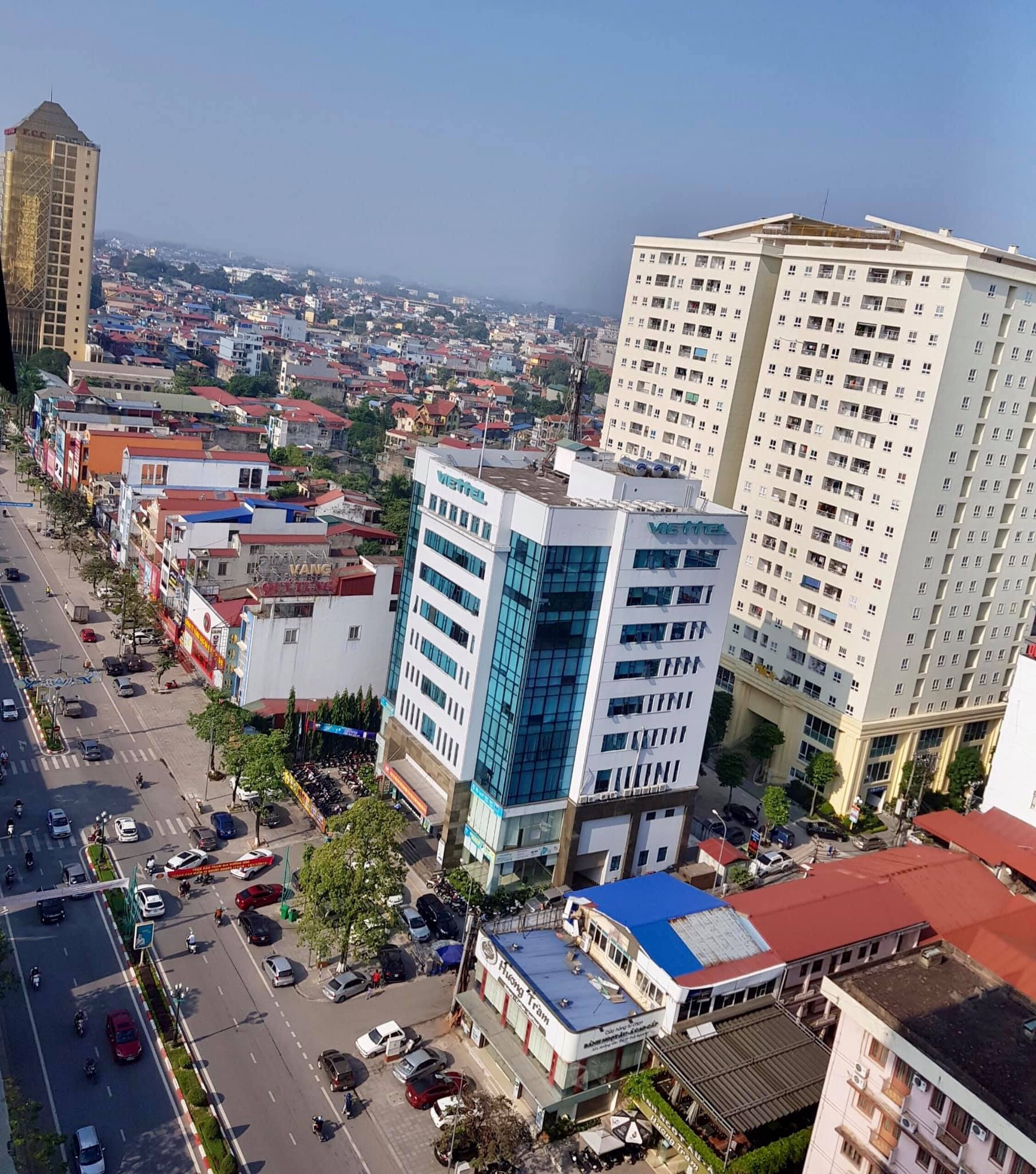 Một góc đường Hoàng Văn Thụ, nhìn từ tòa nhà Kim Thái Hotel